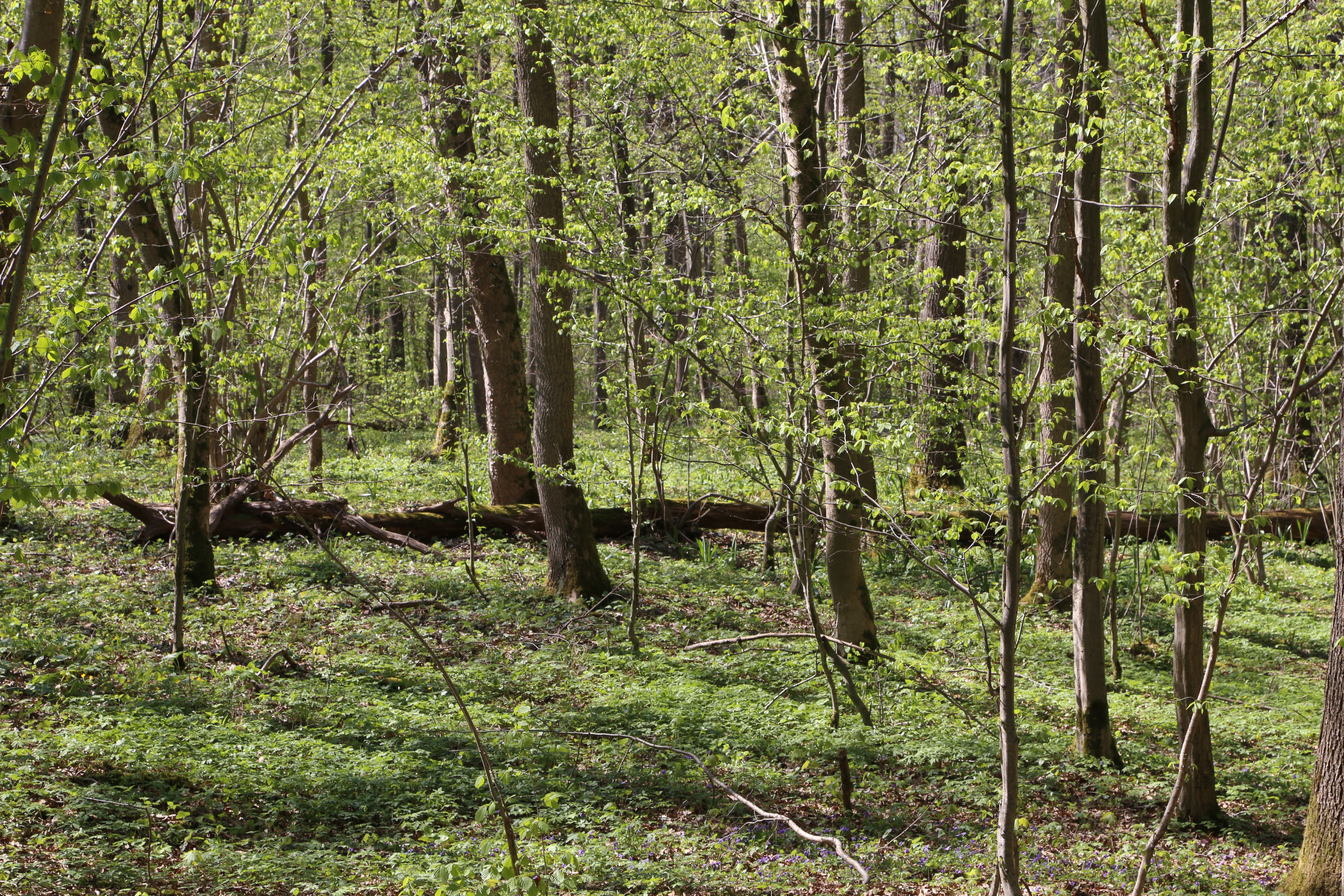 Allacher Forst, Allach, München